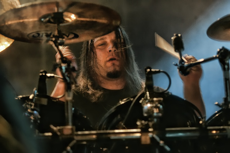 Witchmaster, Wrocław, Firlej, 6.09.2011